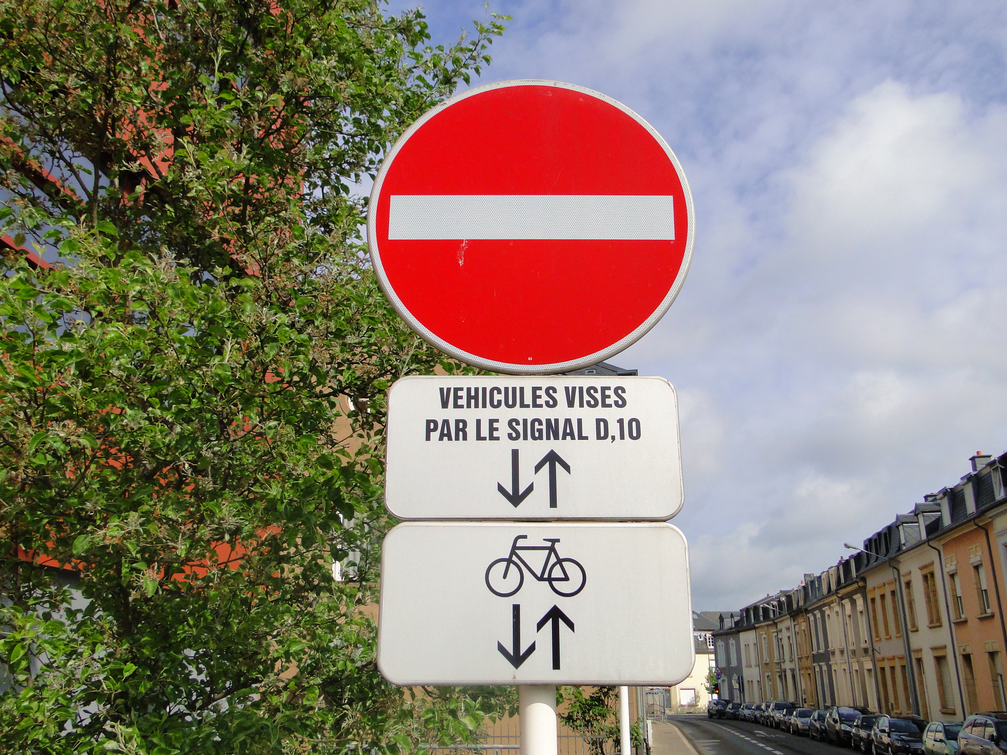 Verkéiersschëld C,1a aus dem Lëtzebuerger Code de la route mam Zousazschëld Modell 6c